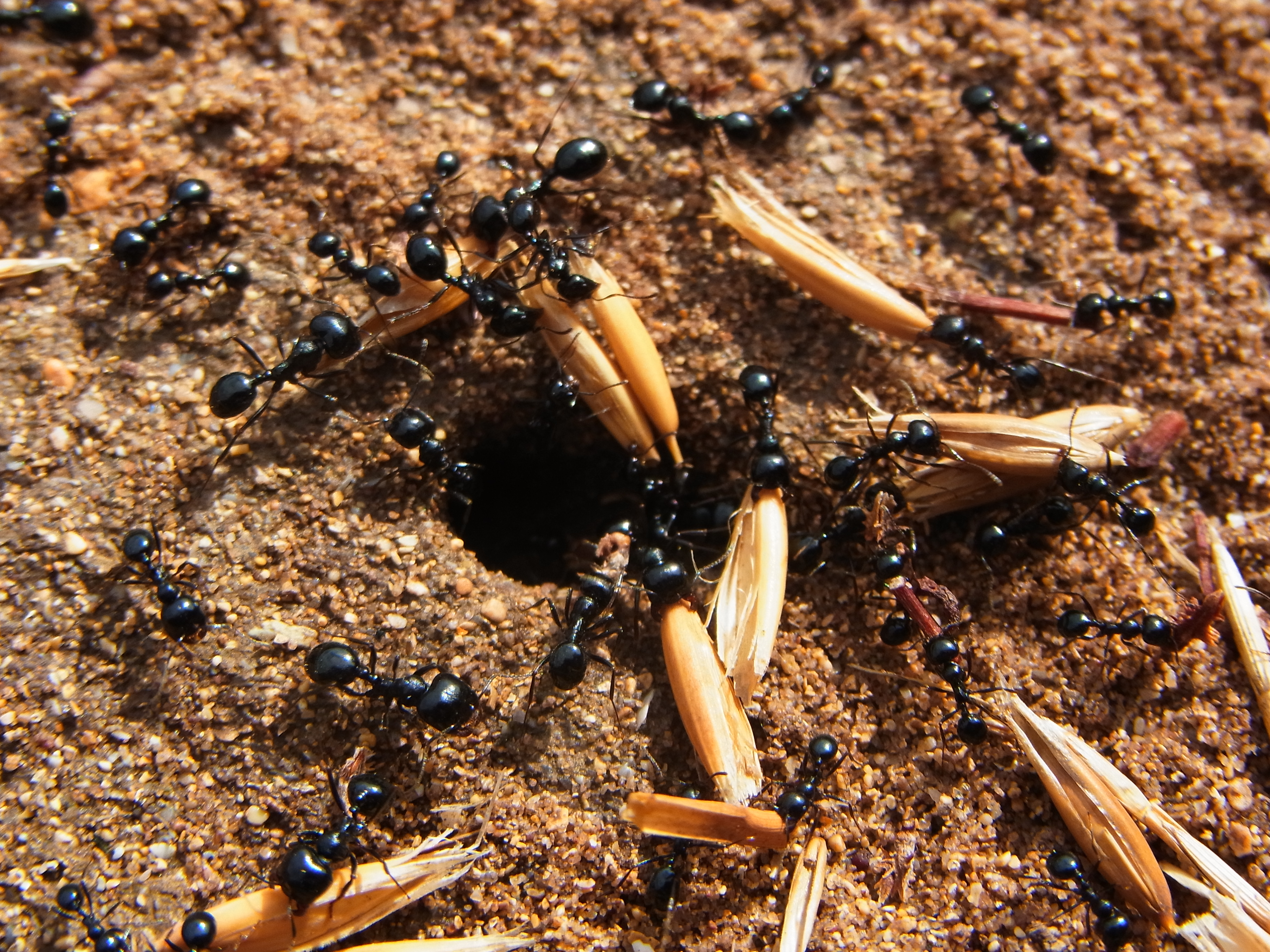 Ameisen der Gattung Messor tragen Getreidekörner in ihren Bau ein, La Valls, Menorca